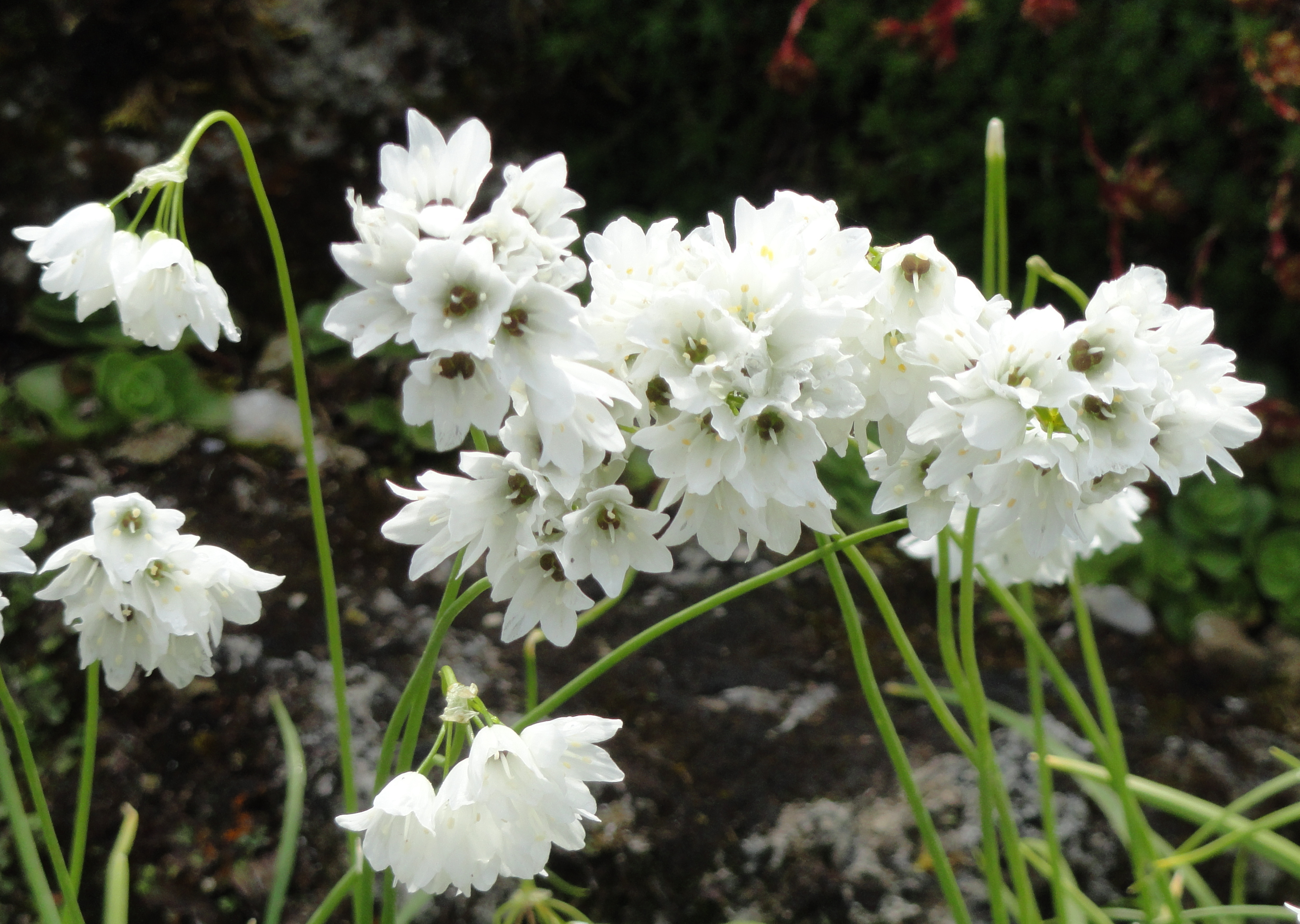 Allium zebdanense specimen in the Botanischer Garten München-Nymphenburg, Munich, Germany.